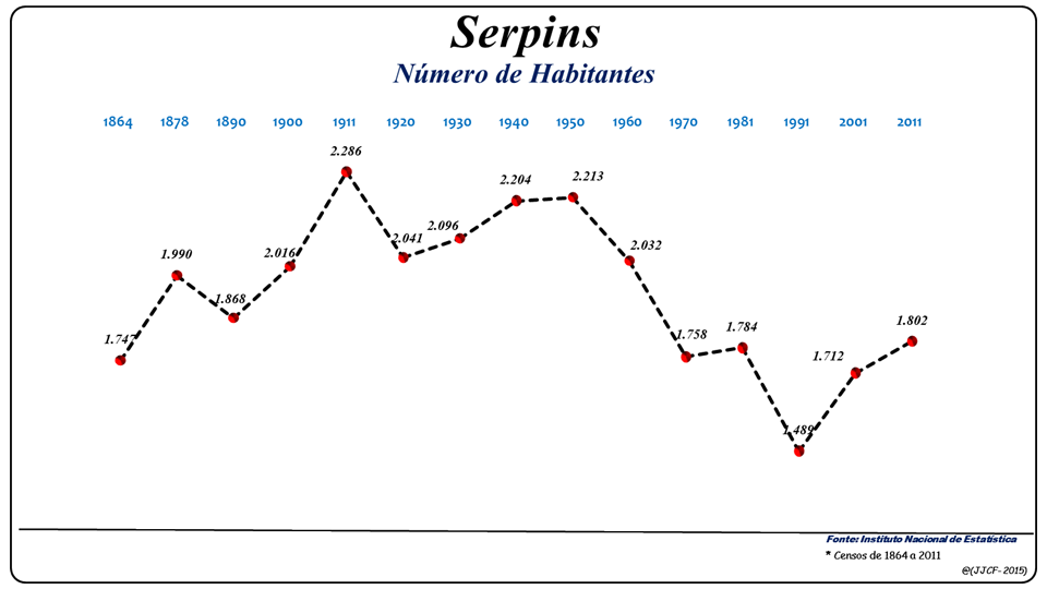 População